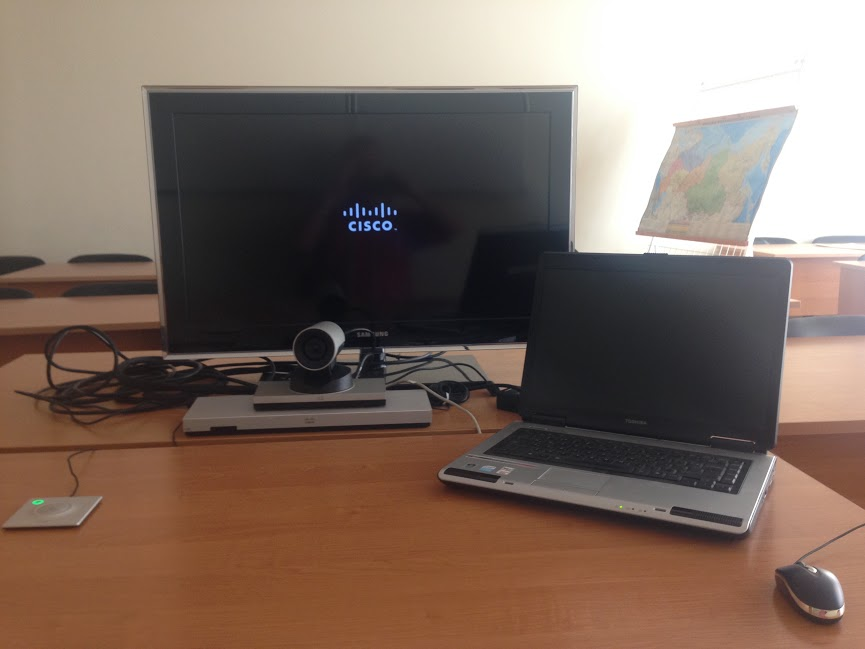 Комплекс Tandberg-Cisco для дистанционного обучения, установленный на факультете ВМК МГУ